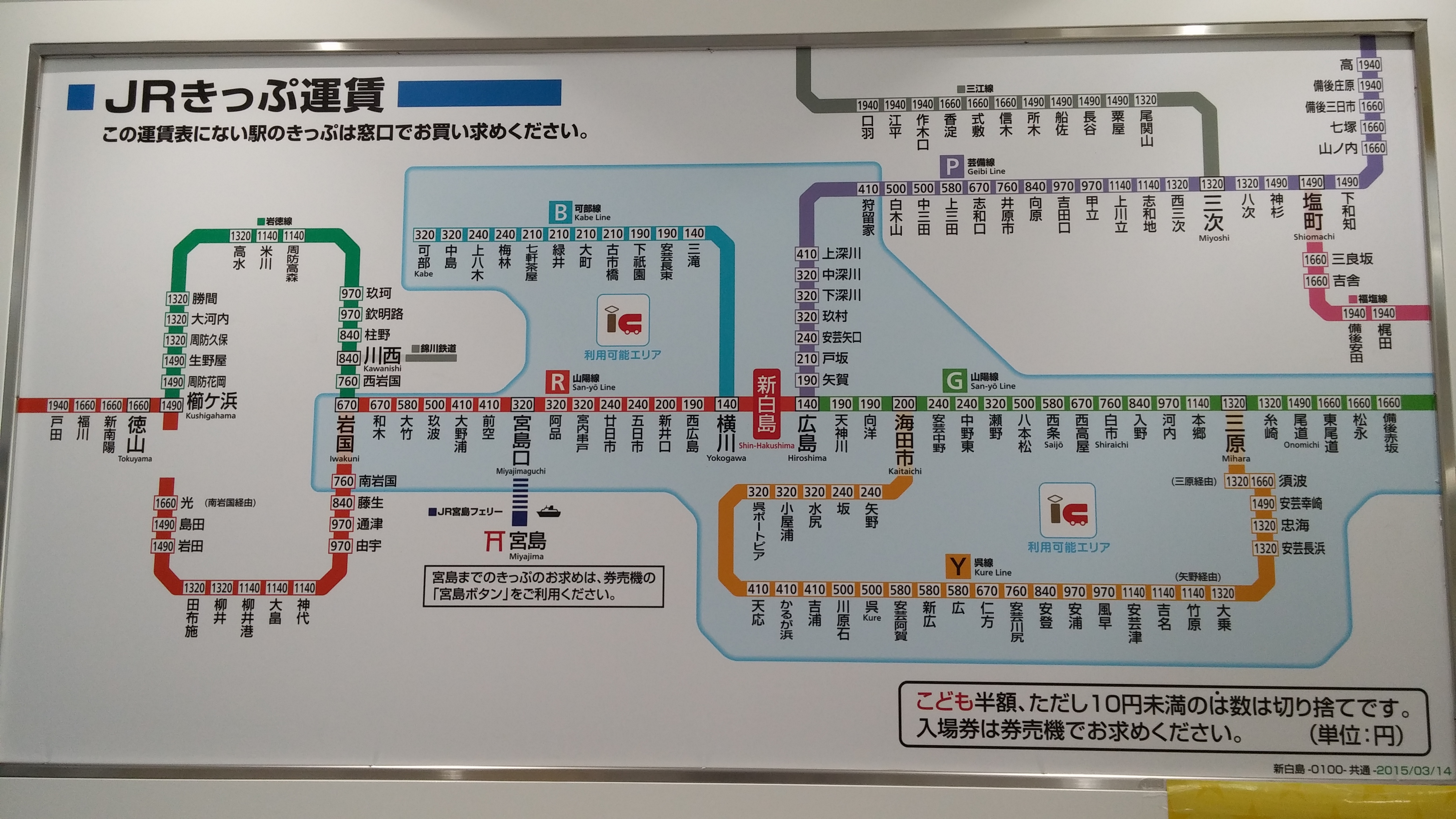 JR新白島駅運賃表（広島シティネットワーク路線記号・ラインカラー対応）